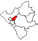 DISTRITO DE EL PORVENIR EN LA PROVINCIA DE TRUJILLO